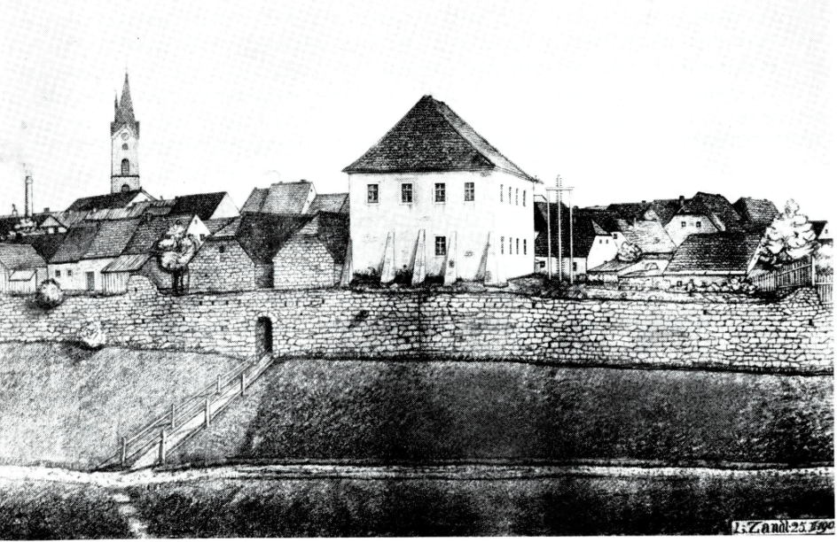 Foto des Pflegeschlosses Bärnau von L. Zandt von vor 1900